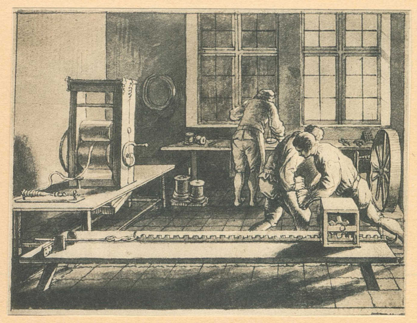 Tab. LVI c. Der Drahtzieher. (Beschreibung lt. Quelle)